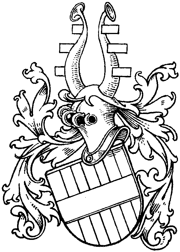 Stammwappen derer von Brackel